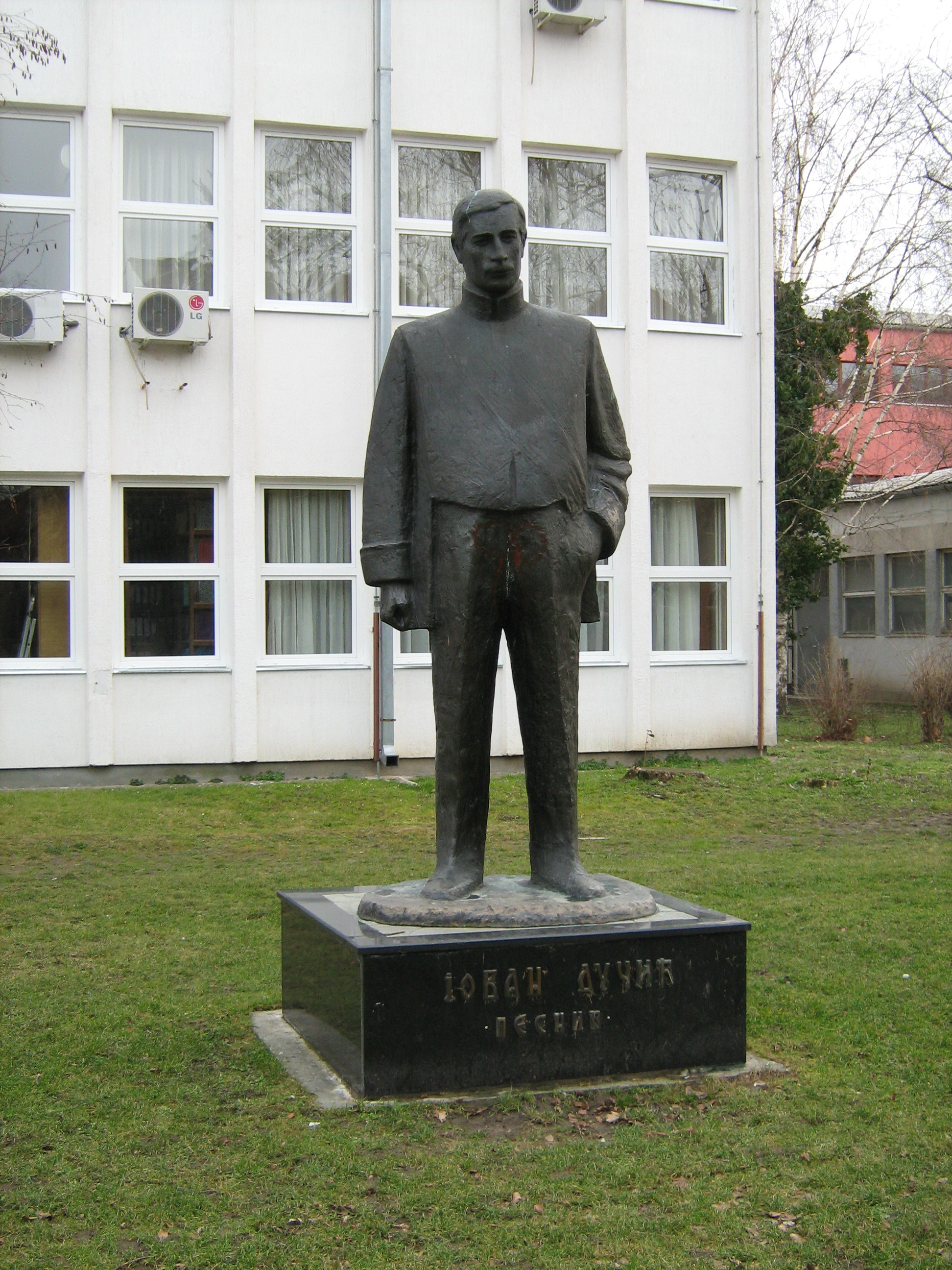 Spomenik Jovanu Dučiću ispred Pedagoškog fakulteta u Somboru,isti spomenik postoji i u rodnom Trebinju.Slika je moje vlasništvo.